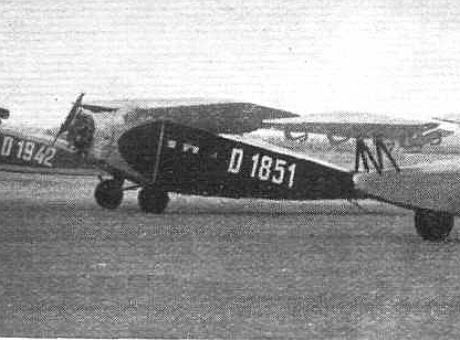 Focke-Wulf A 33 "Sperber" z magazínu Flight